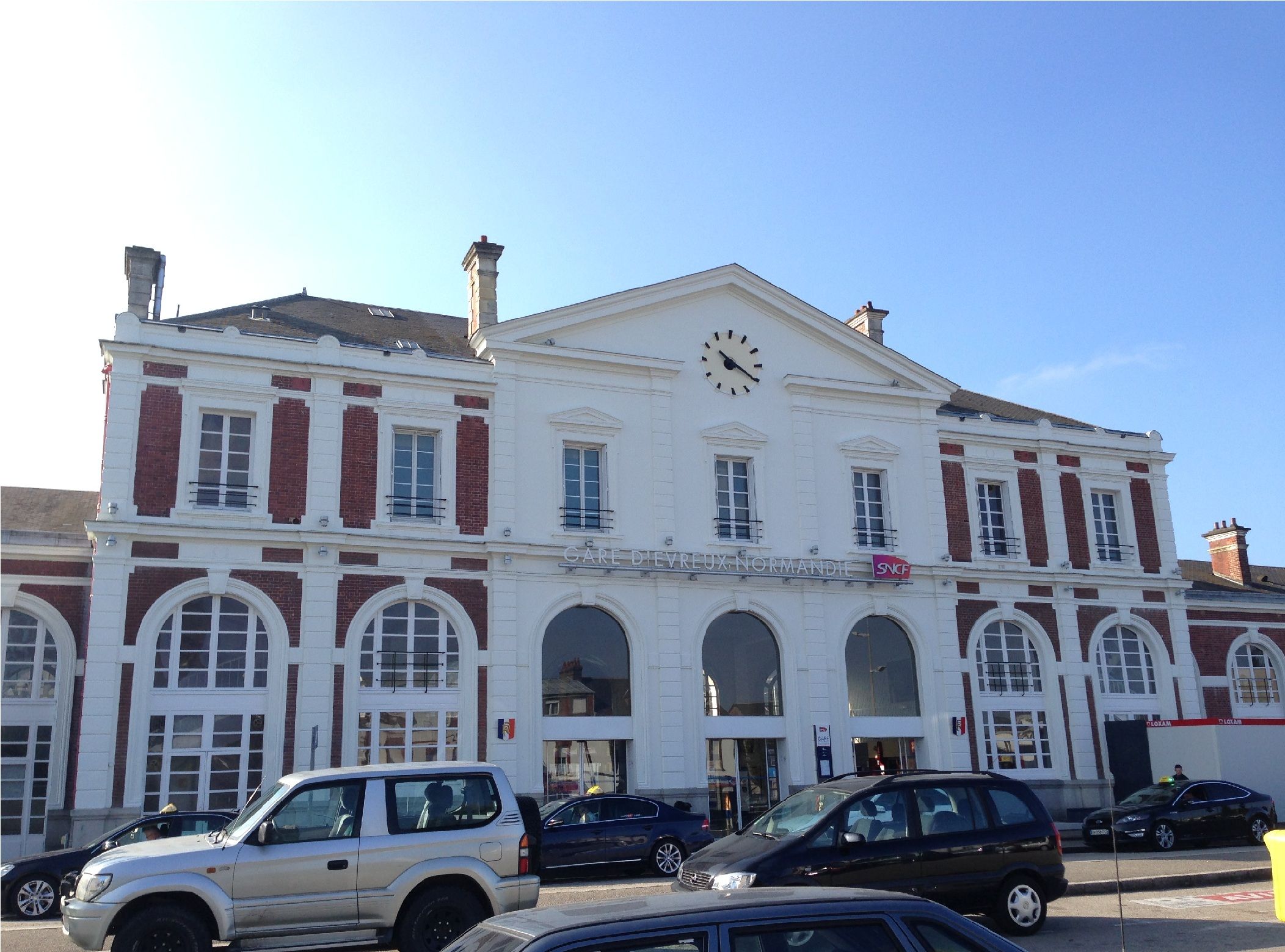 Gare d'Évreux-Normandie